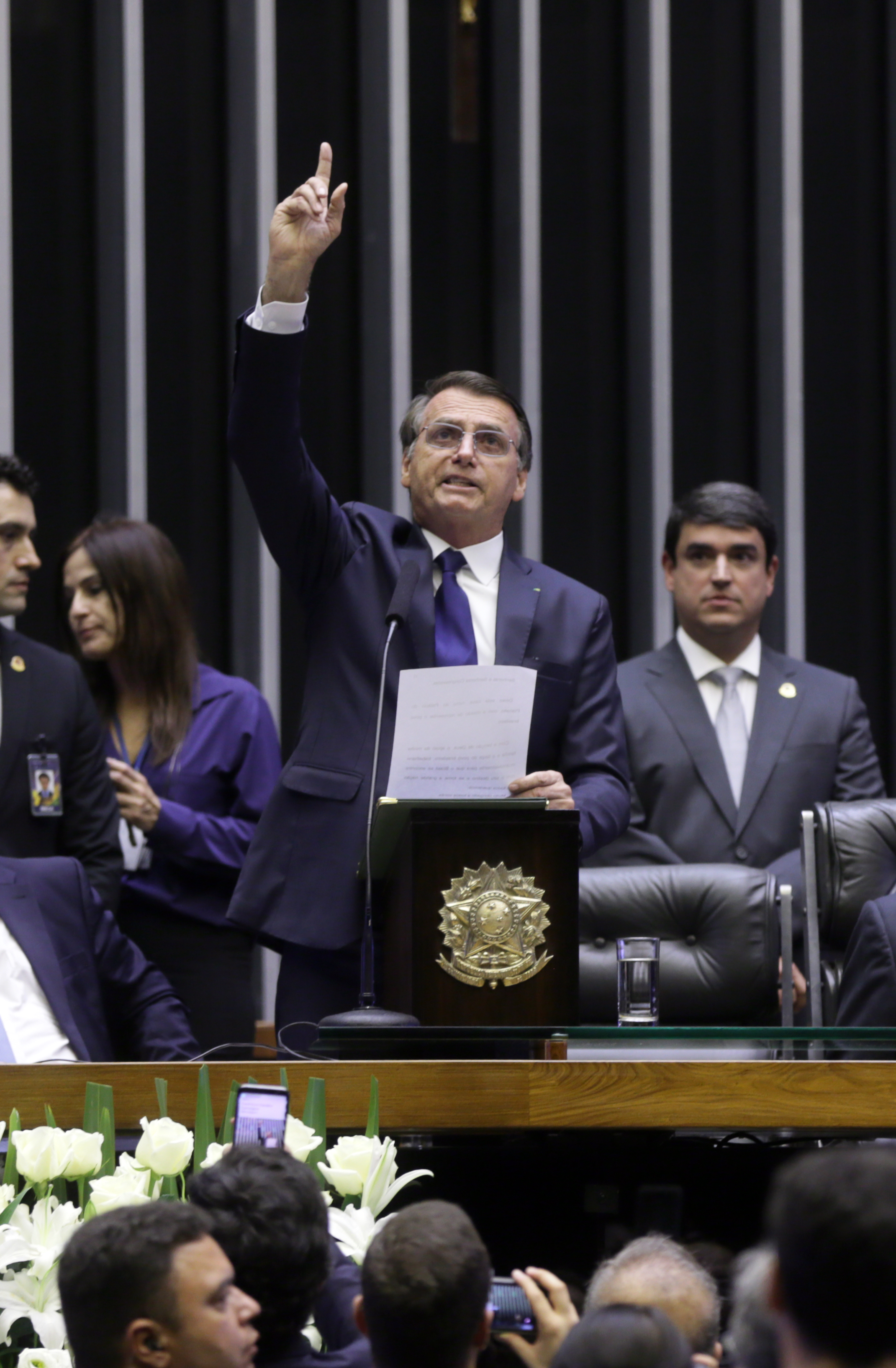 Discurso de posse do presidente da República, Jair Bolsonaro